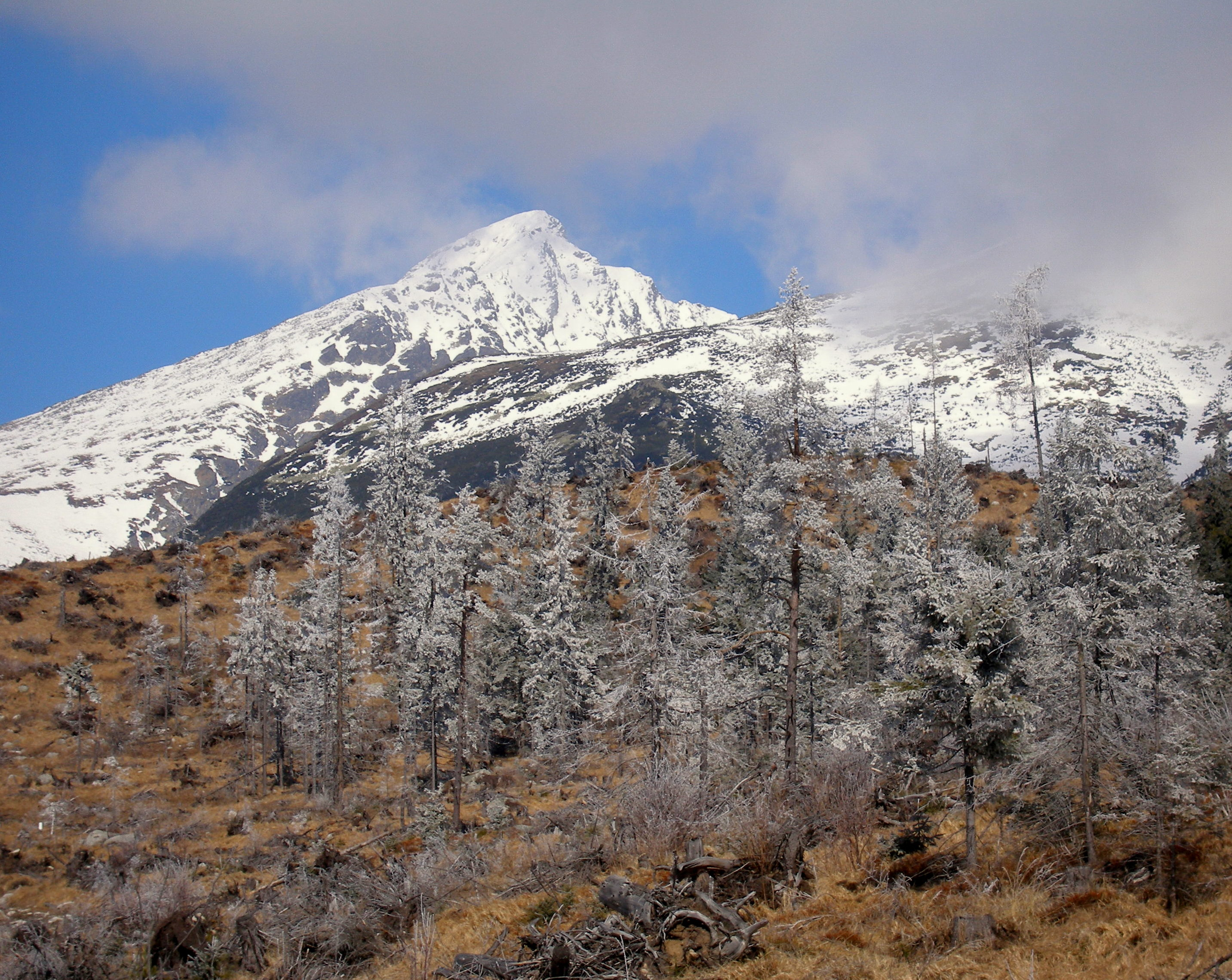 Pohľad na tatranský štít Kriváň. Slovensko Vysoké Tatry.